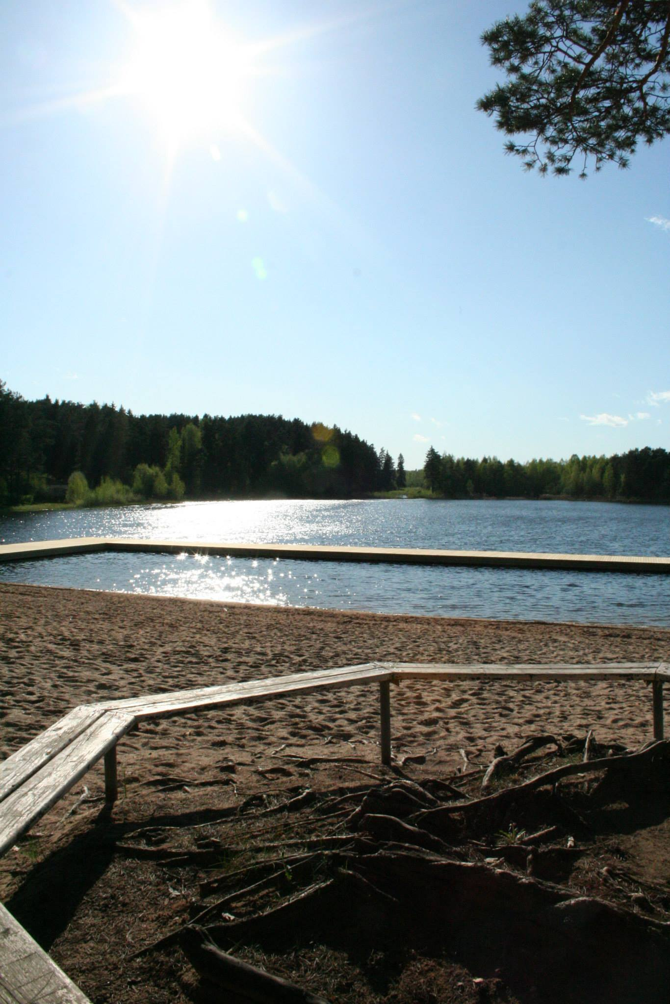 Vaade Verevi järvele